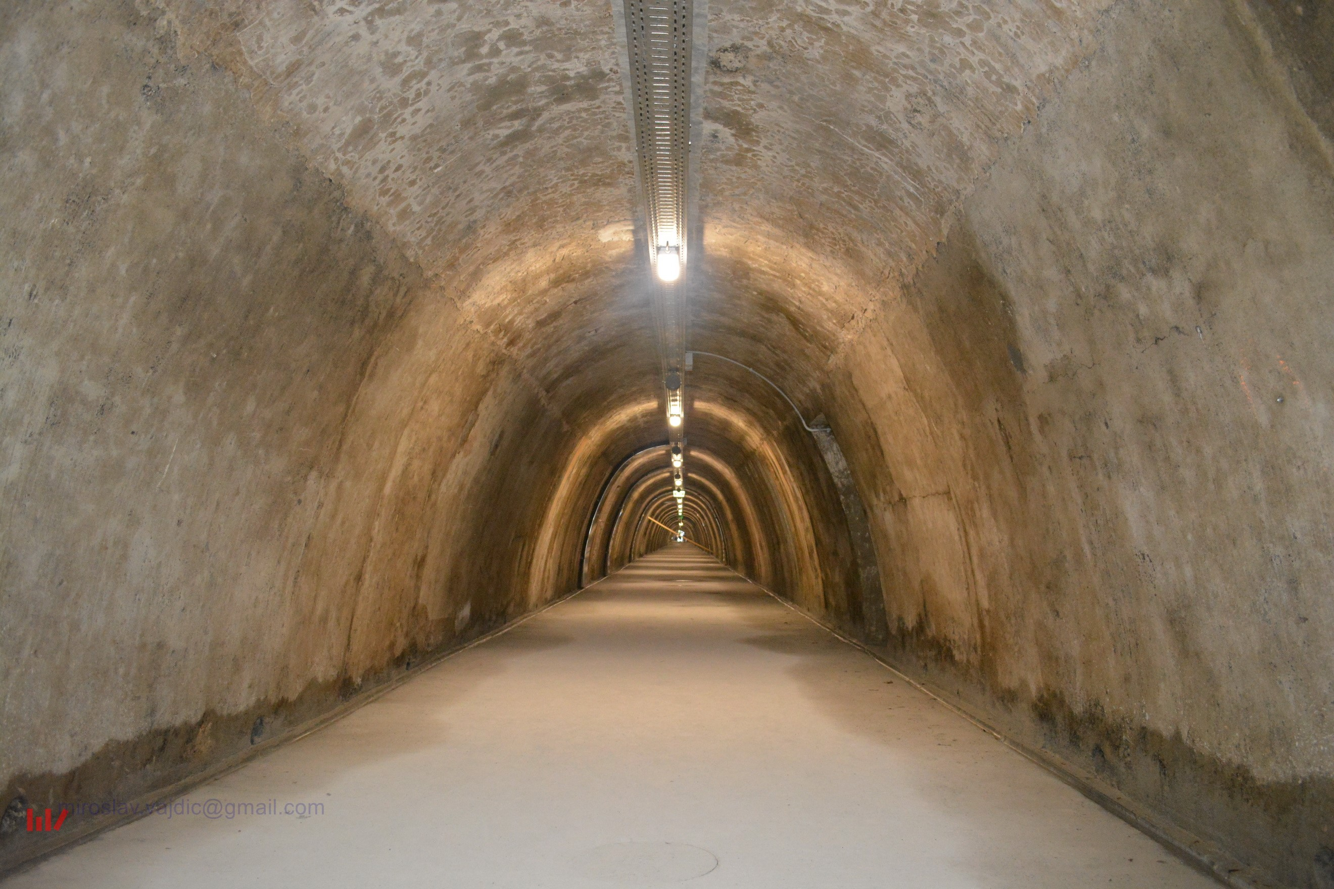 Underground tunnels beneath Zagreb